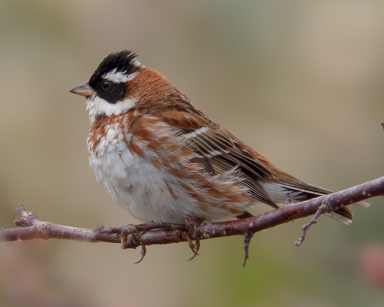 カシラダカ